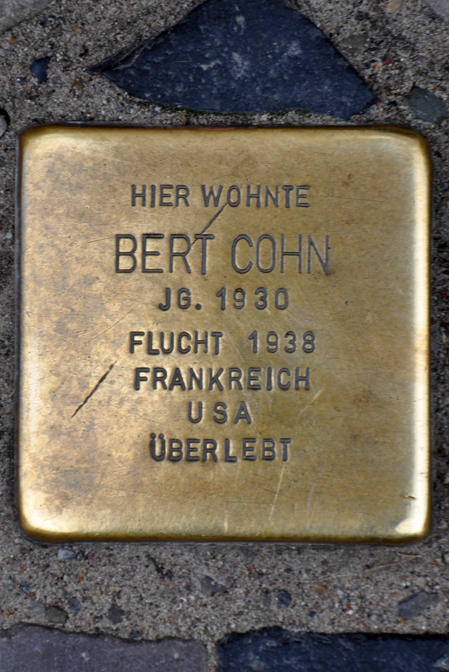 Stolperstein in Stralsund, Ossenreyerstraße 21/22. Der Stolperstein ist einer von fünf Stolpersteinen an dieser Adresse. Text: Hier wohnte Bert Cohn Jg. 1930 Flucht 1938 Frankreich USA überlebt